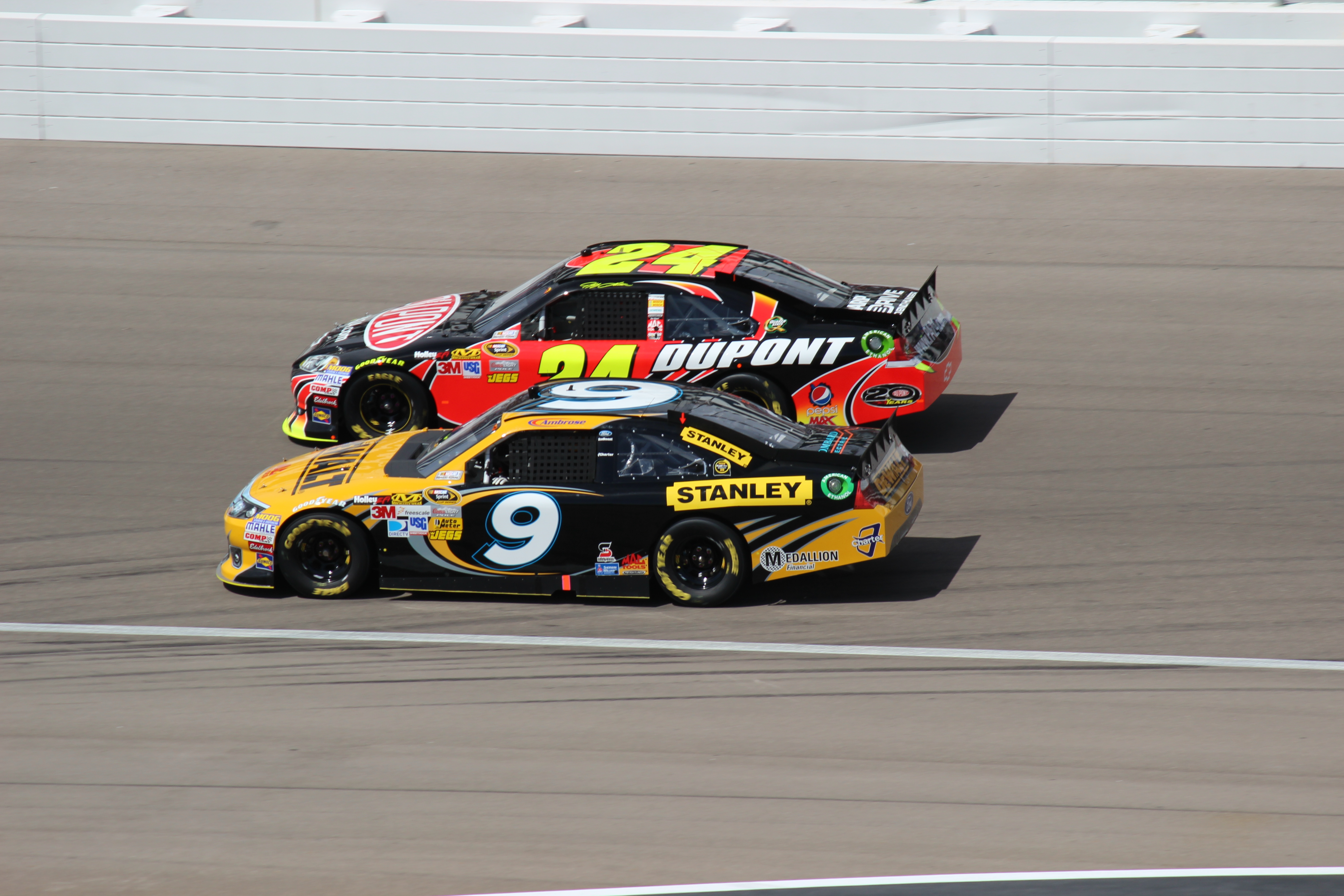 Jeff Gordon vs. Marcos Ambrose